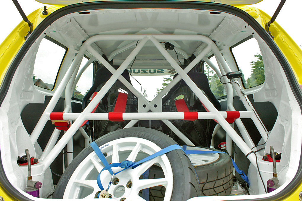 Suzuki Swift JWRC 05.